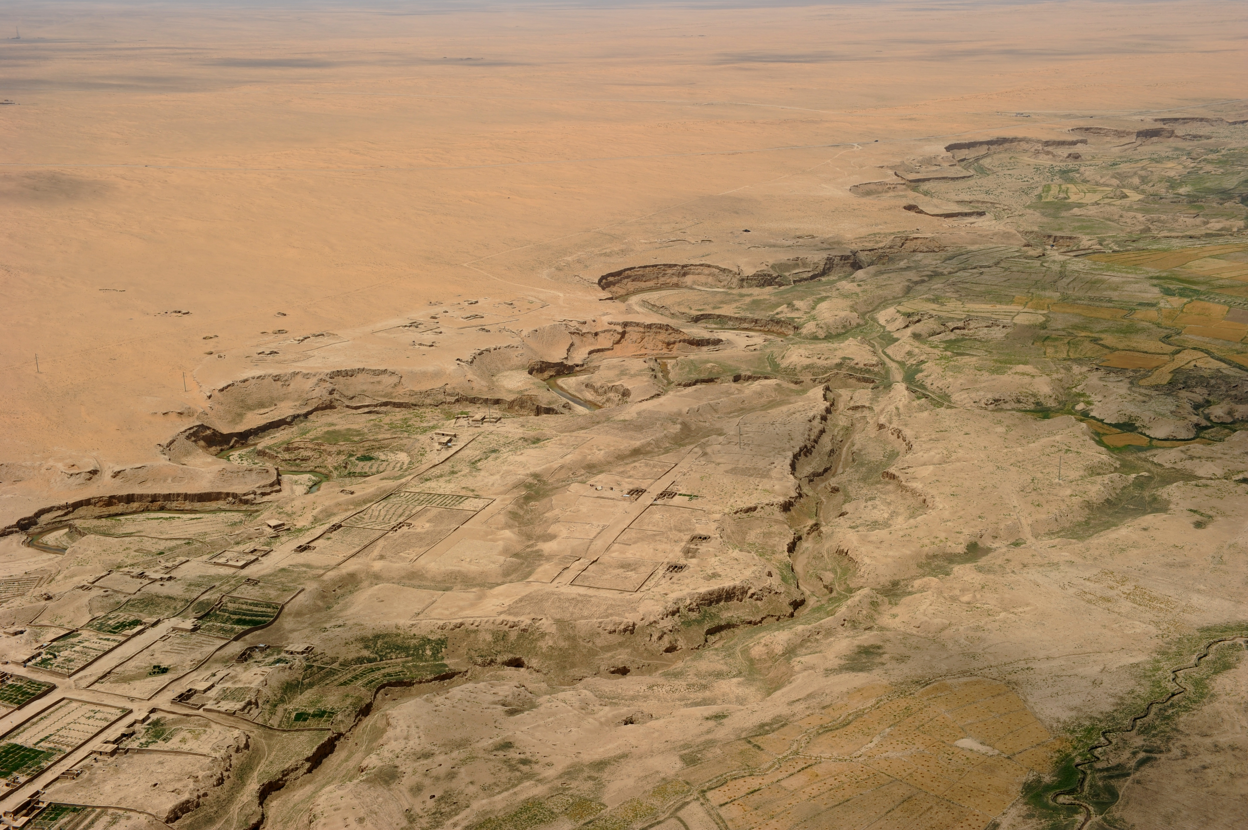 ジューズジャーン州近郊の川